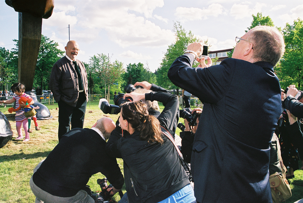 Jim Dine uppvaktas av pressen i samband med avtäckningen av hans verk Walking to Borås. Foto: David Thåst/Diform.